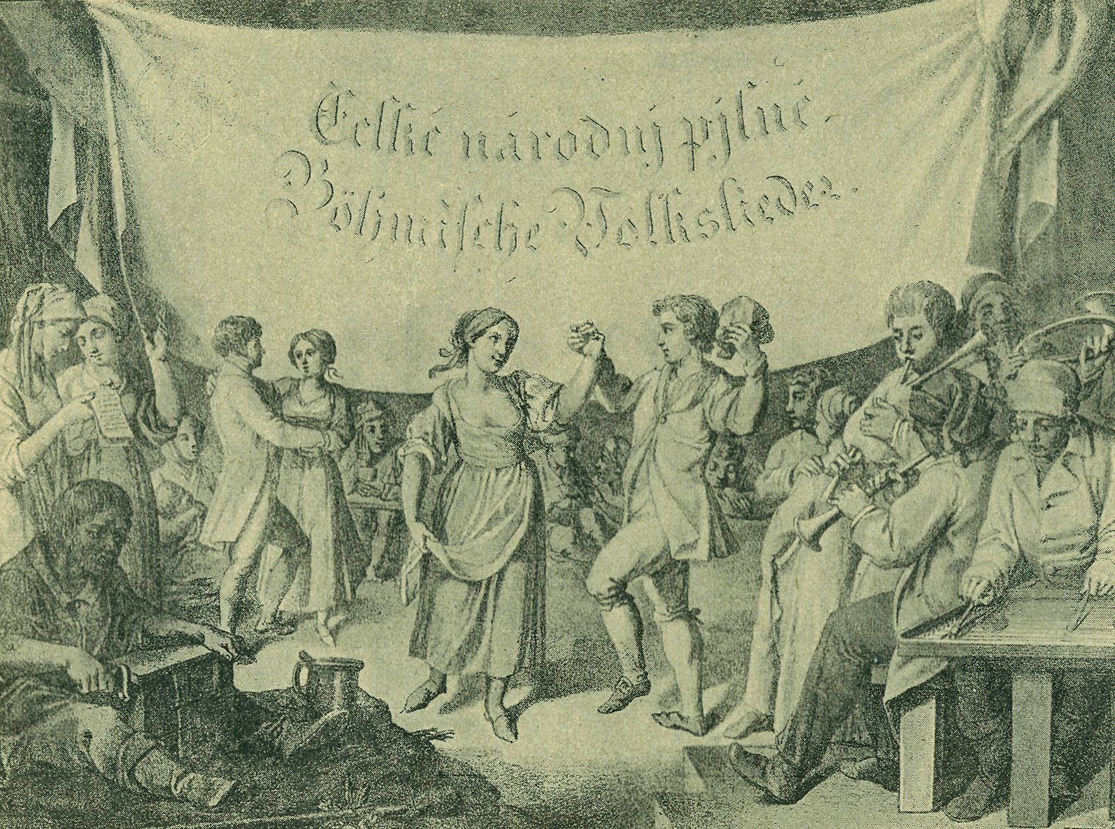 Праздник св. Катерины ("Музыканты, музыканты, хорошо играйте..."). Чехия, 1910